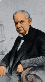 Copia fotográfica de un retrato pictórico del escritor y político argentino, autor de la letra del Himno Nacional Argentino.